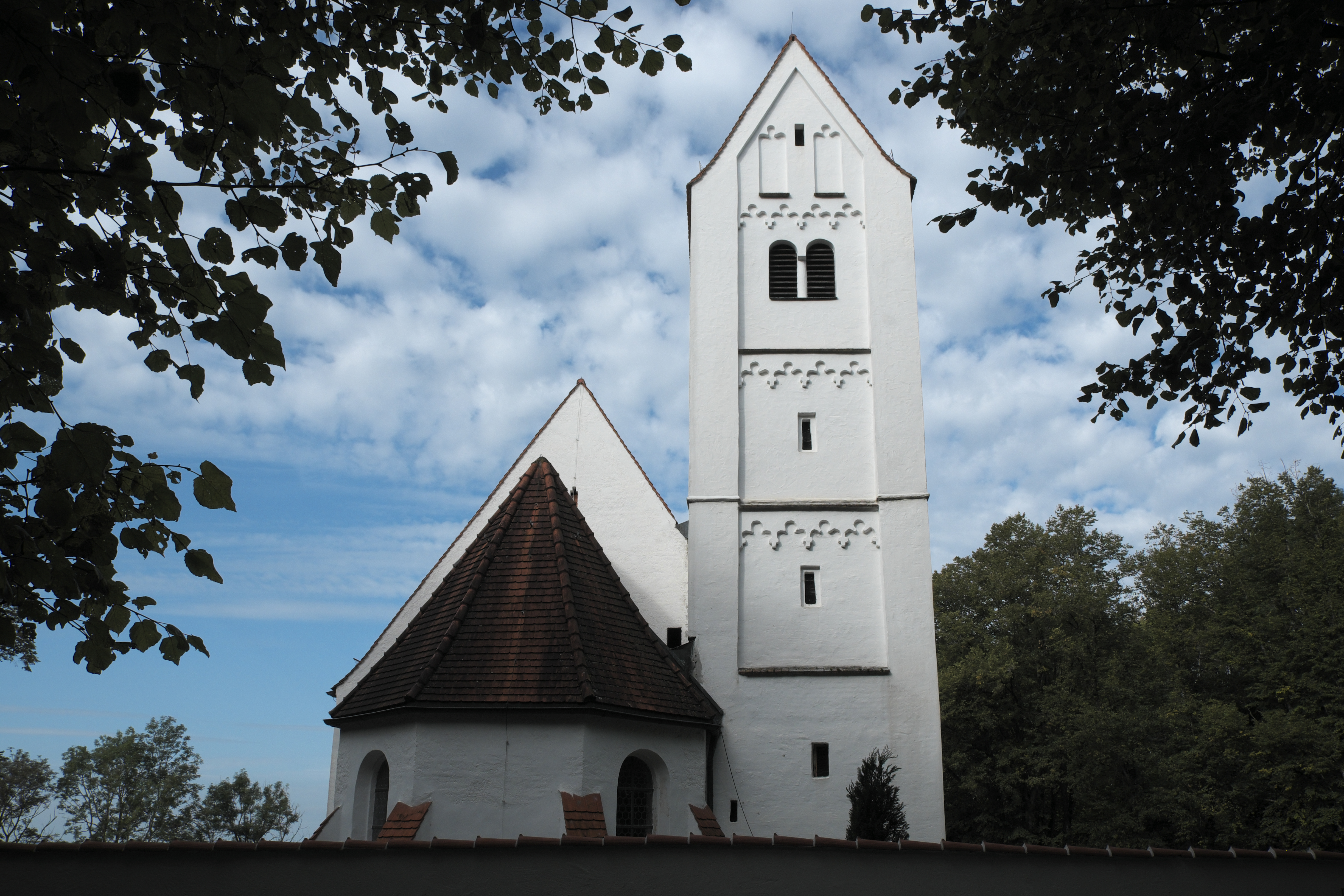 Katholische Filialkirche St. Michael, heute Friedhofskirche, in Waalhaupten (Waal) im Landkreis Ostallgäu (Bayern/Deutschland)